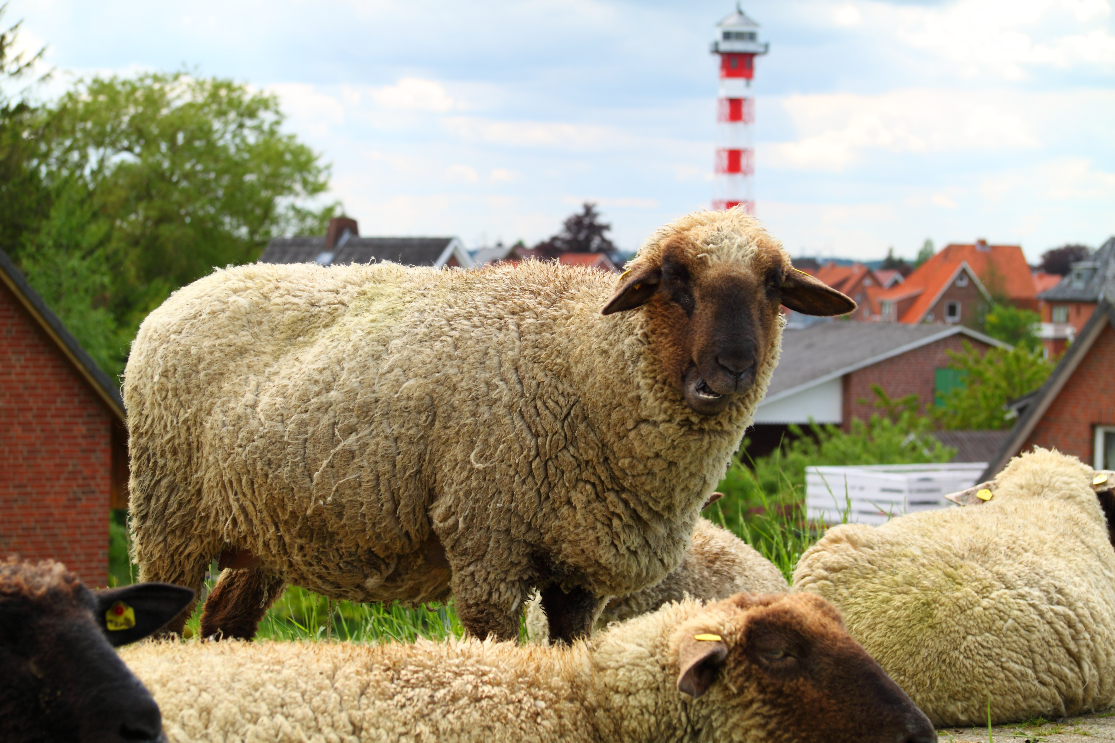 Grazing sheep on the levee in Grünendeich